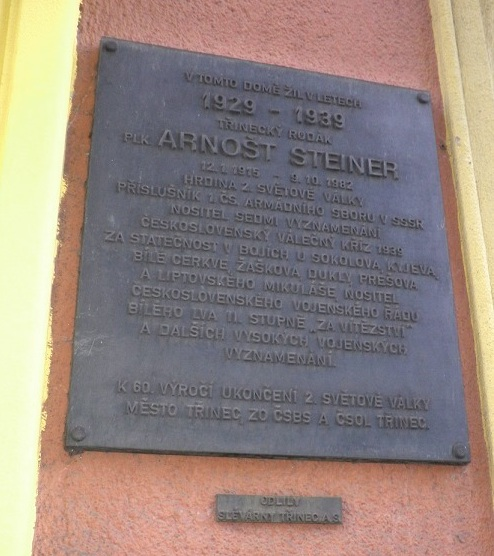 Pamětní deska Arnošta Steinera na Poštovní ul. v Třinci